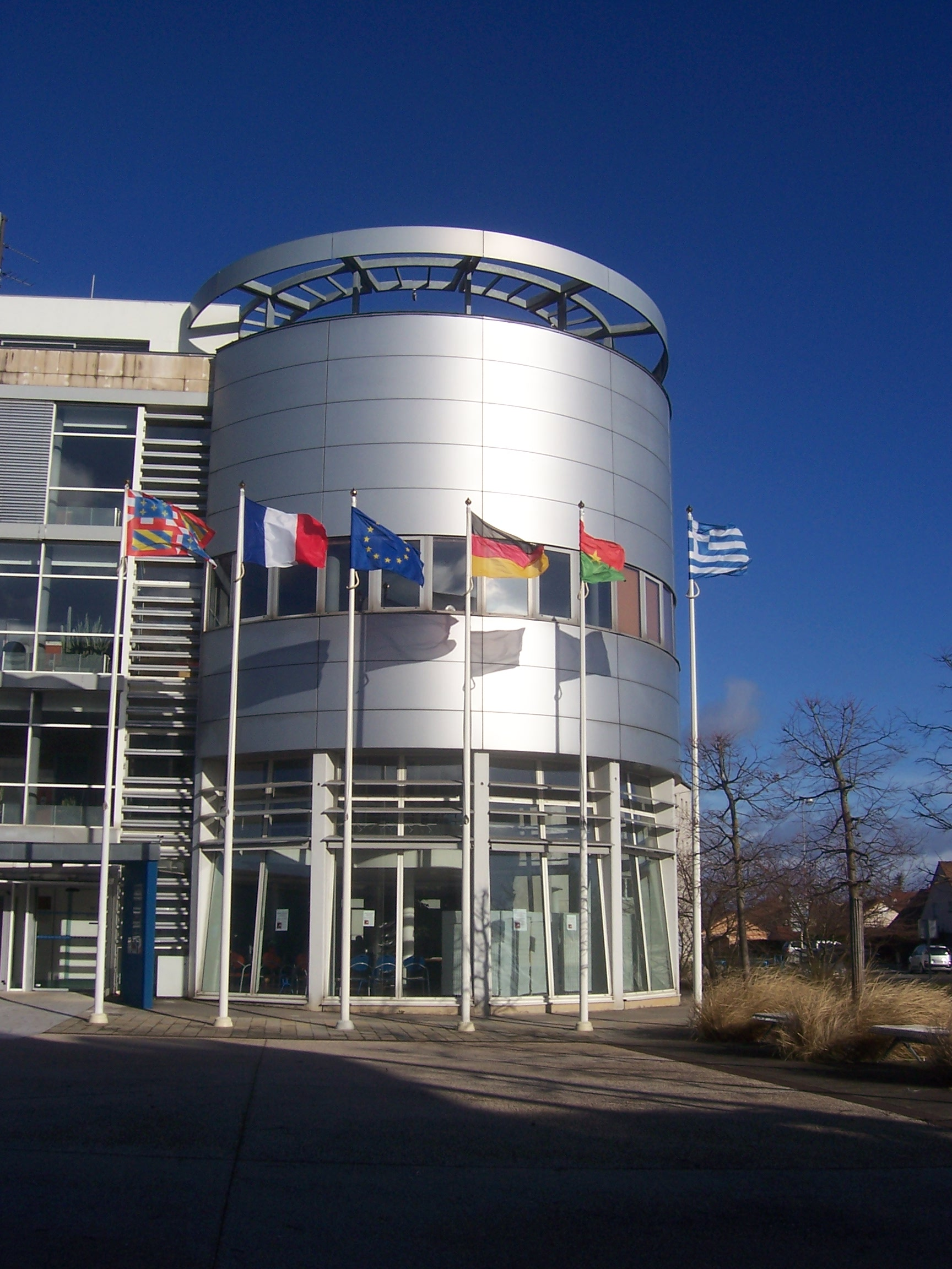 Saint-Remy Mairie